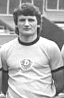 Title: Mannschaftsfoto SG Dynamo Dresden Factual corrections and alternative descriptions are encouraged separately from the original description. Additionally errors can be reported at this page to inform the Bundesarchiv. Original historic description: ADN-ZB-Häßler-16.9.80-Dresden: Fußball-Oberliga. Die Mannschaft der SG Dynamo Dresden für die Spielserie 1980-81. Stehend v.l.n.r.: Mannschaftskapitän Hans-Jürgen Dörner, Andreas Schmidt, Gerd Weber, Andreas Trautmann, Karsten Petersohn, Udo Schmuck, Christian Helm und Reinhard Häfner. Vorn v.l.n.r.: Gerd Heidler, Peter Kotte, Torhüter Jörg Klimpel, Torhüter Claus Boden, Torhüter Bernd Jakubowski, Frank Richter und Matthias Müller.